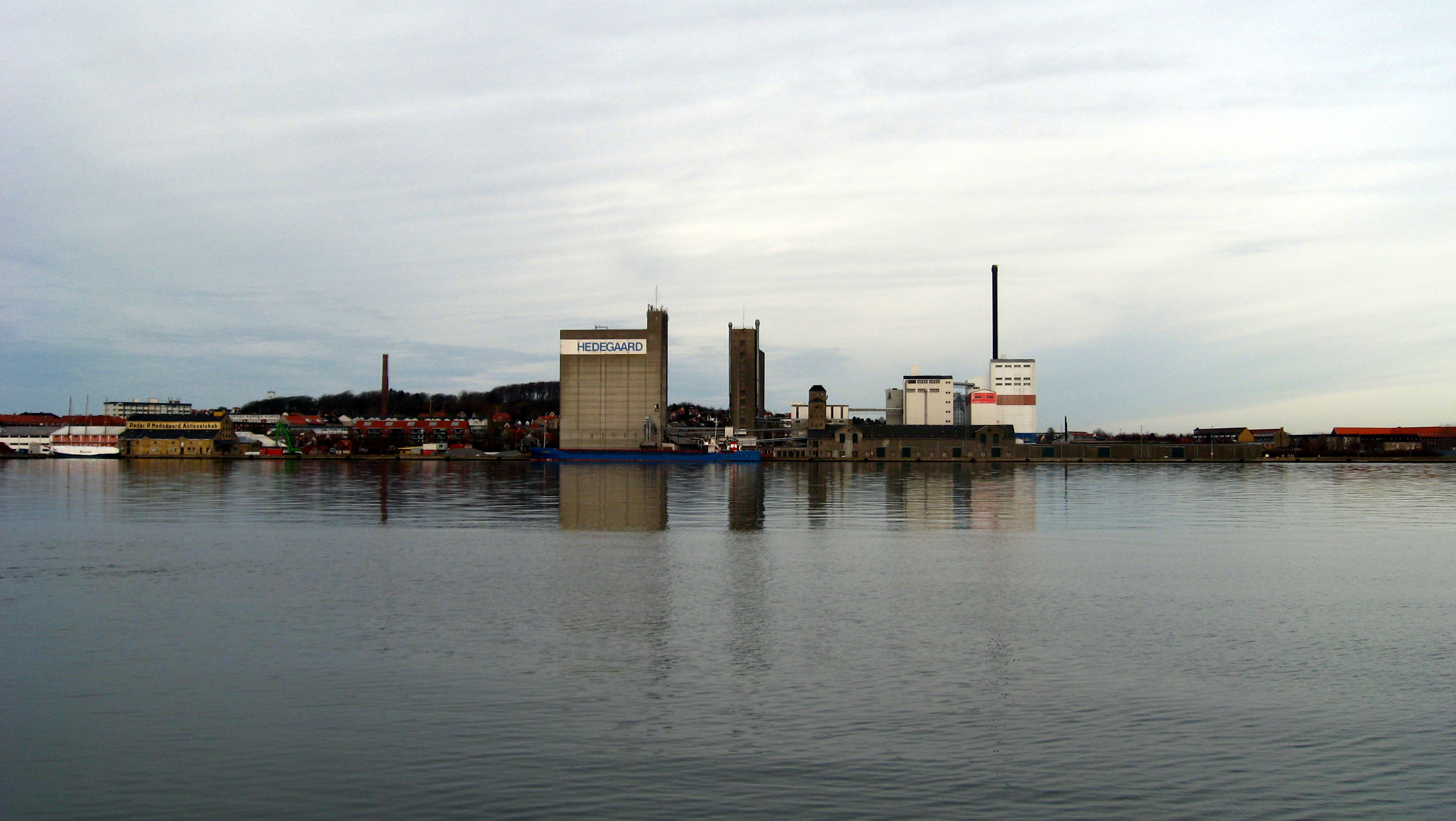 Limfjord, Aalborg, Denmark